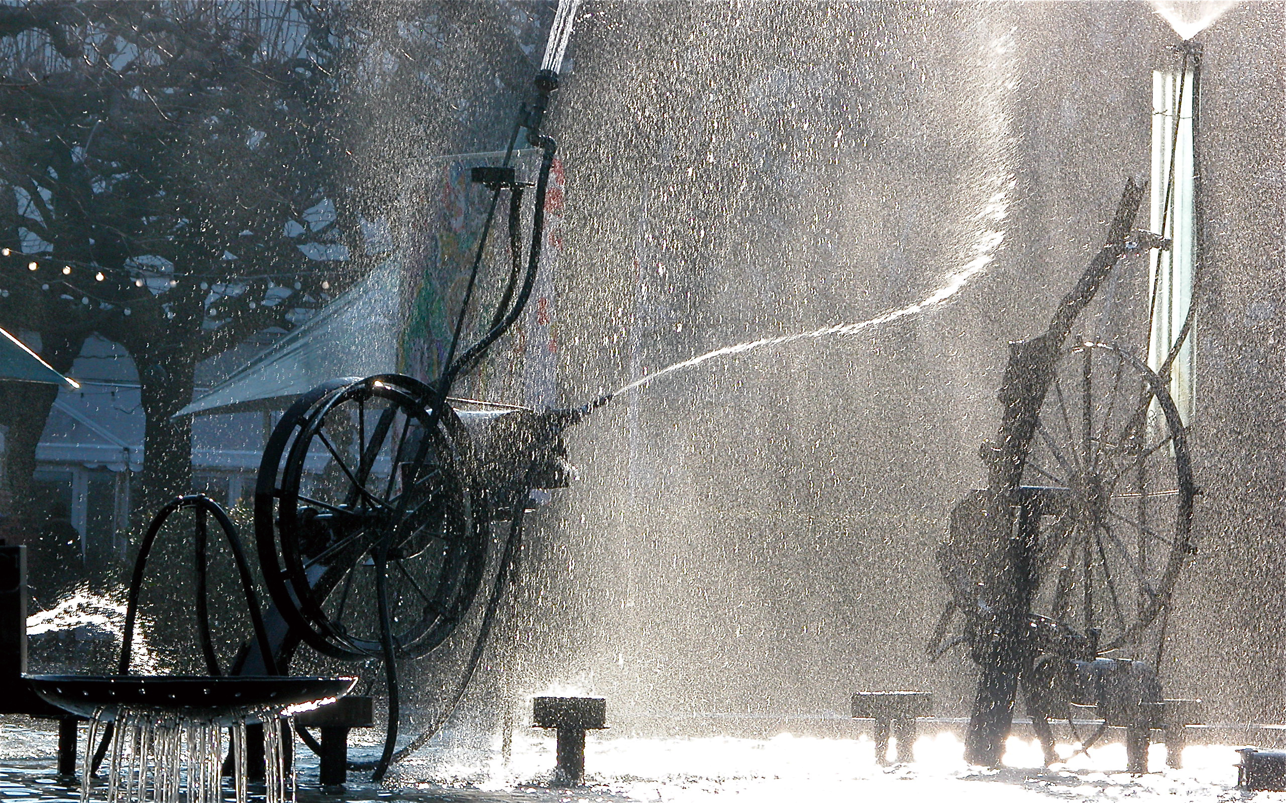 Der Fasnachtsbrunnen, auch Tinguely-Brunnen, in Basel (Schweiz)